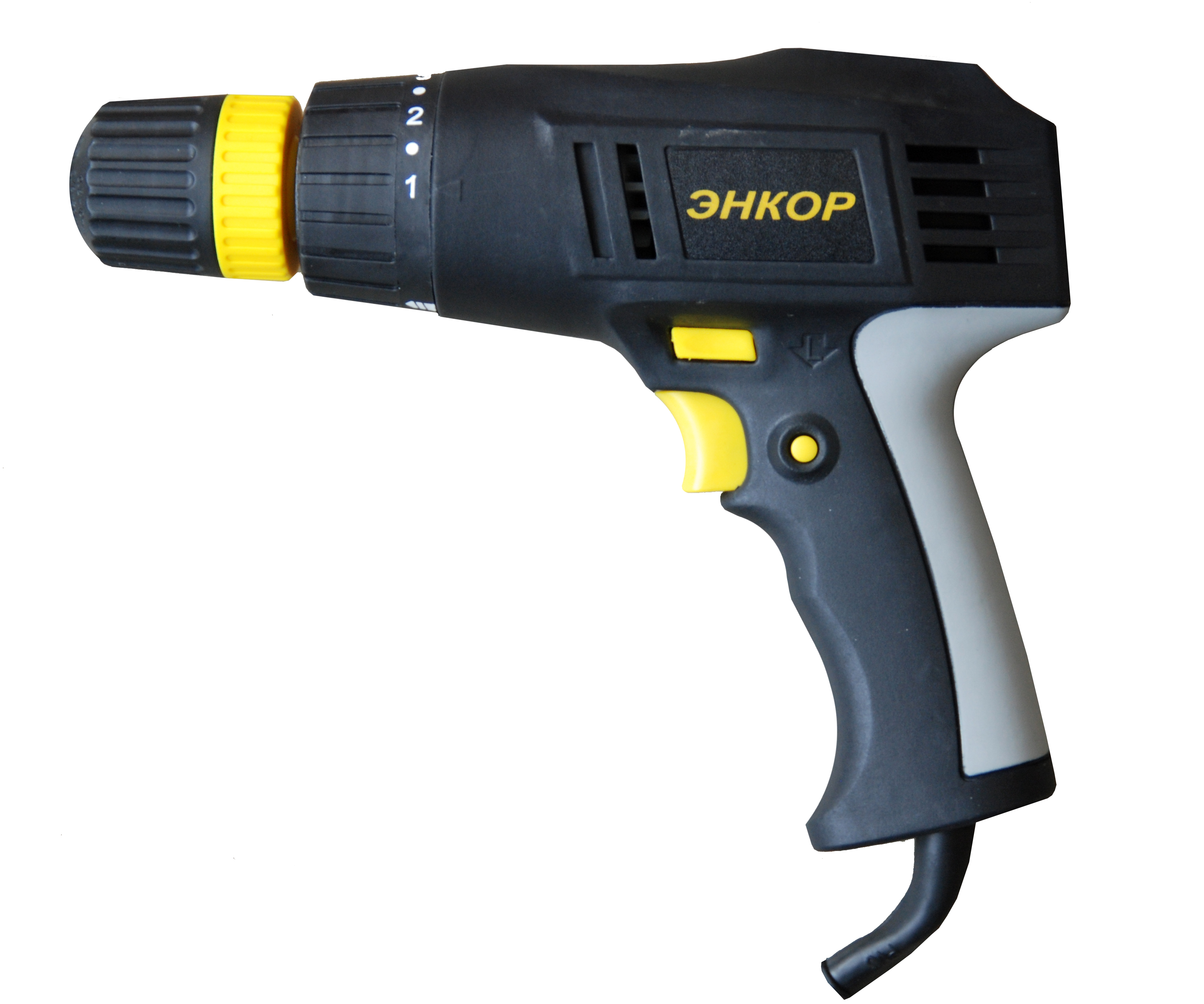 Сетевой шуруповёрт с муфтой-регулятором вращающего момента, реверсом и двухгильзовым быстрозажимным трёхкулачковым патроном